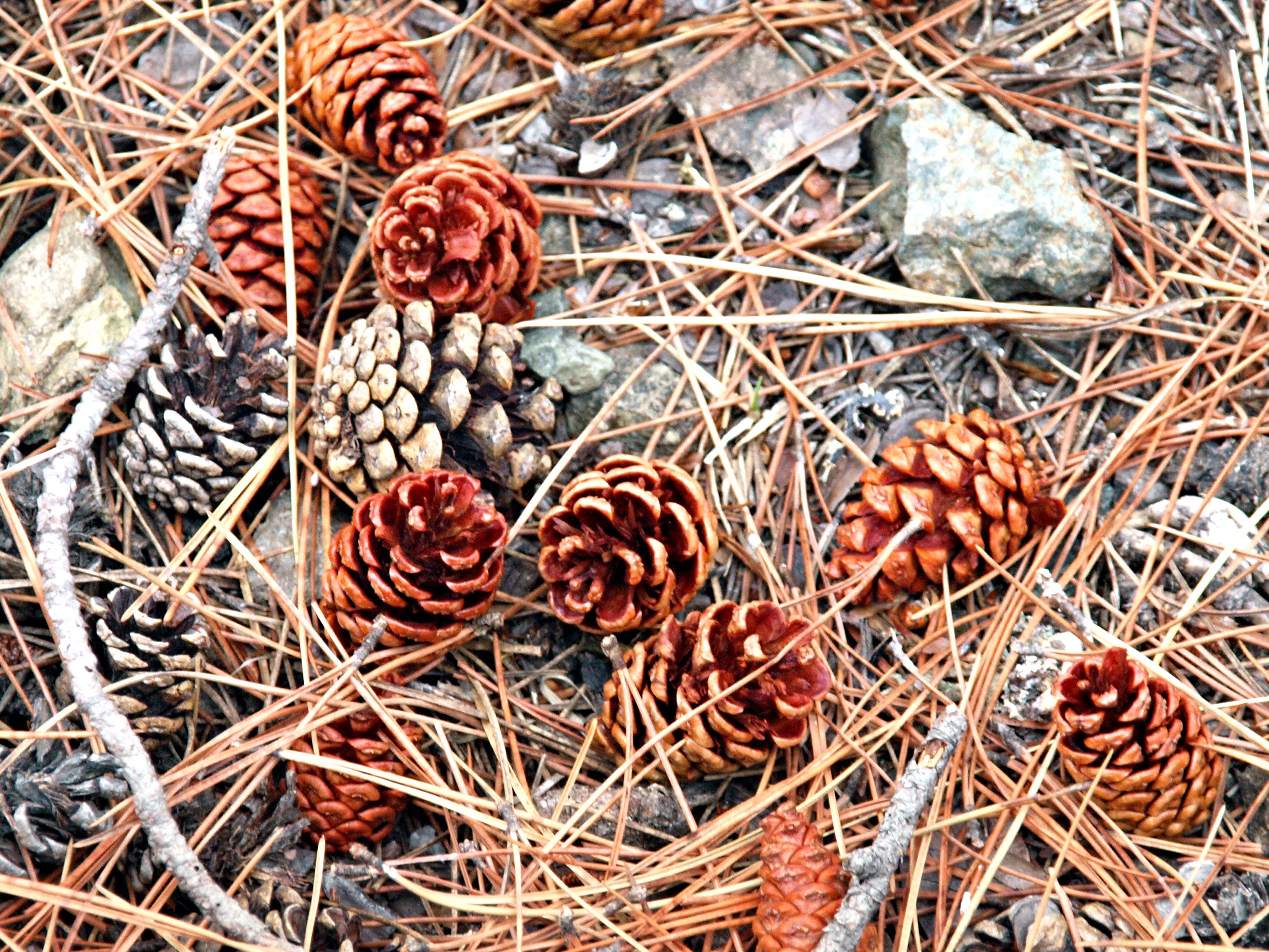 Rospigliani, Centre Corse (Corse) - Pommes de pin noir (Pinus nigra subsp. salzmannii var. corsicana) de la Forêt de Padula